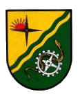 Coat of arms Westertimke, Wappen der Gemeinde Westertimke